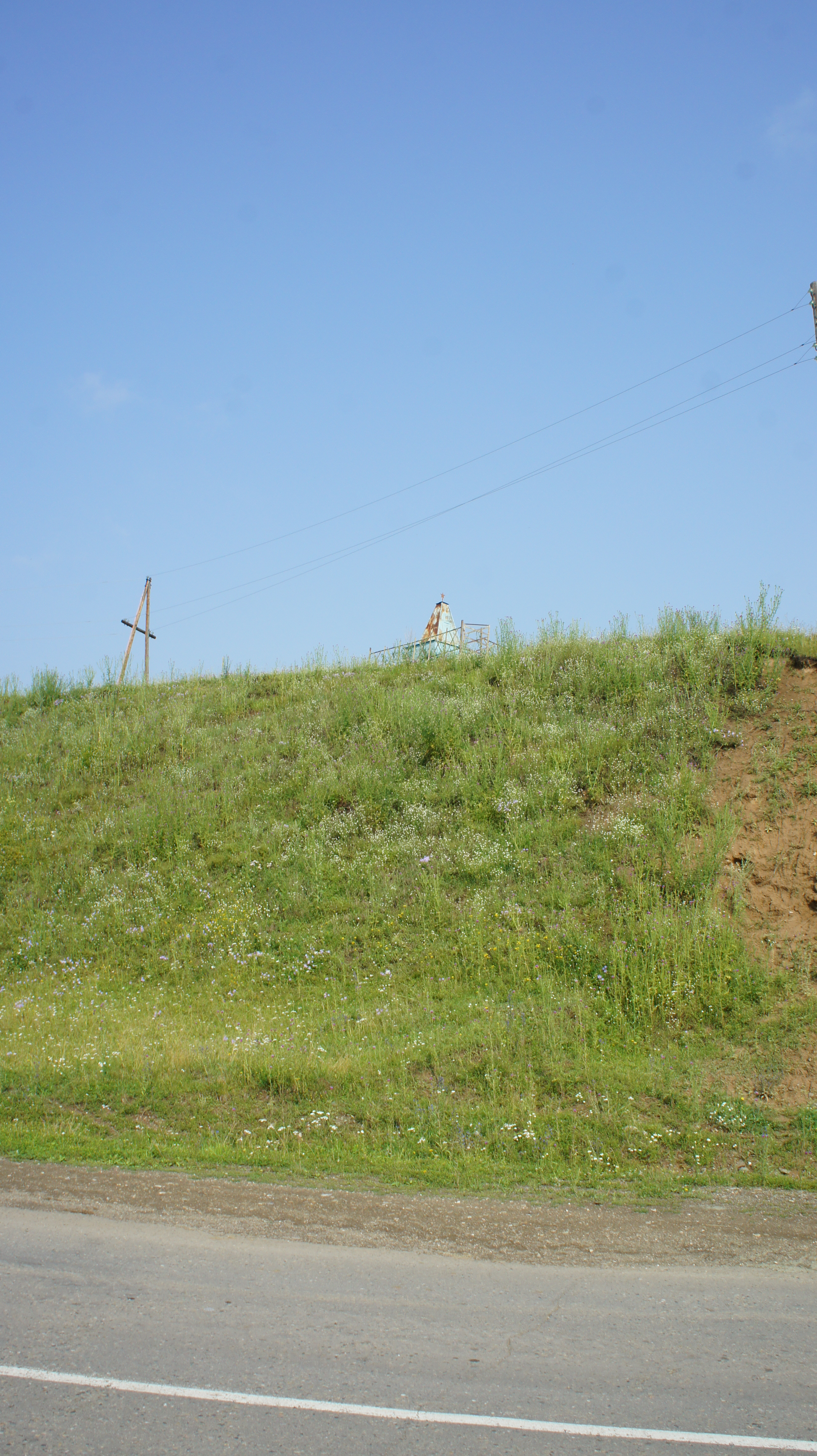 памятник красногвардейцам отряда Сухова в с. Лютаево. Современное состояние